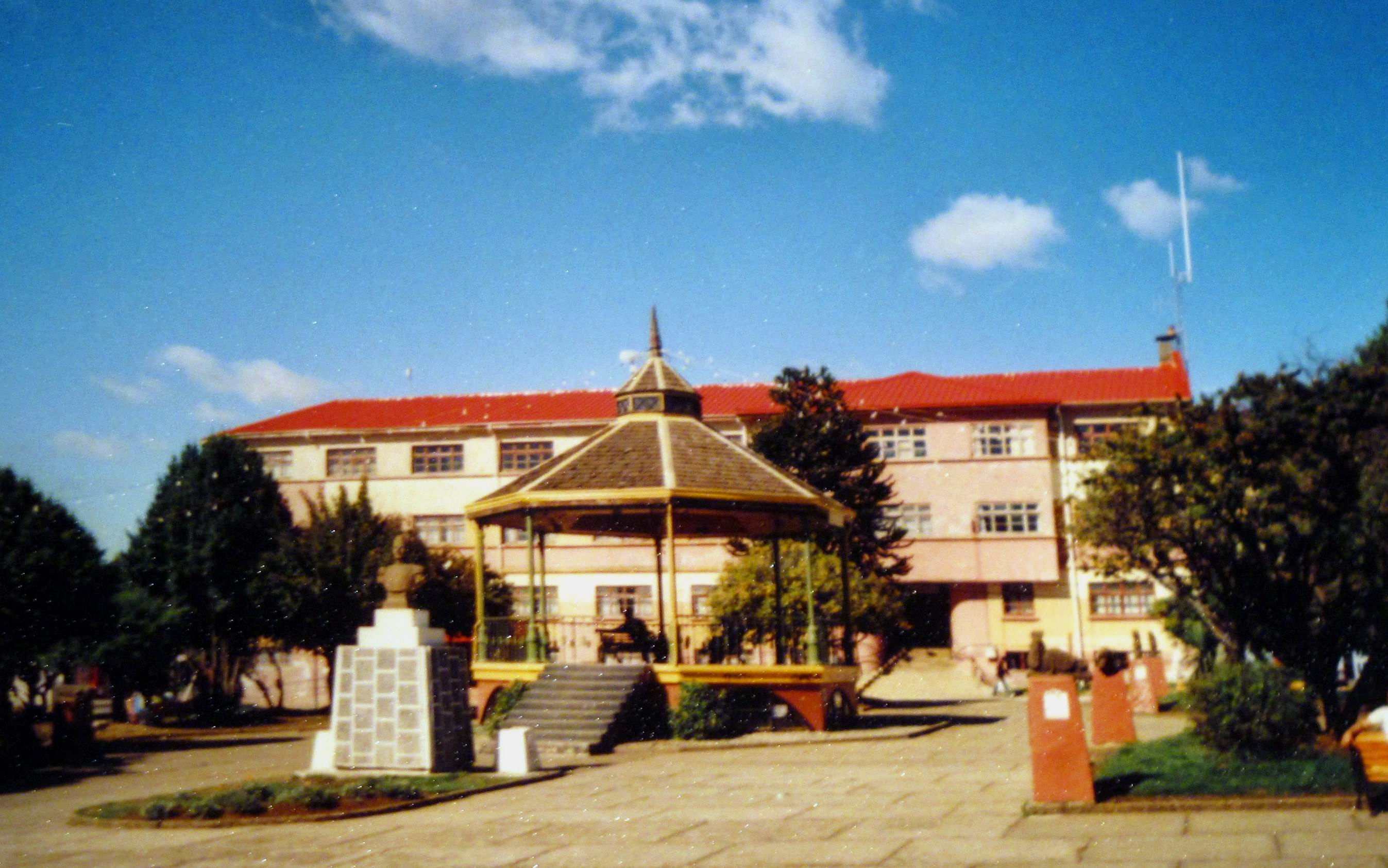 Plaza de Armas con la Municipalidad, Ancud, Isla de Chiloé, Chile